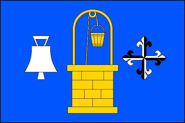 Vlajka obce Studnice (okres Chrudim)